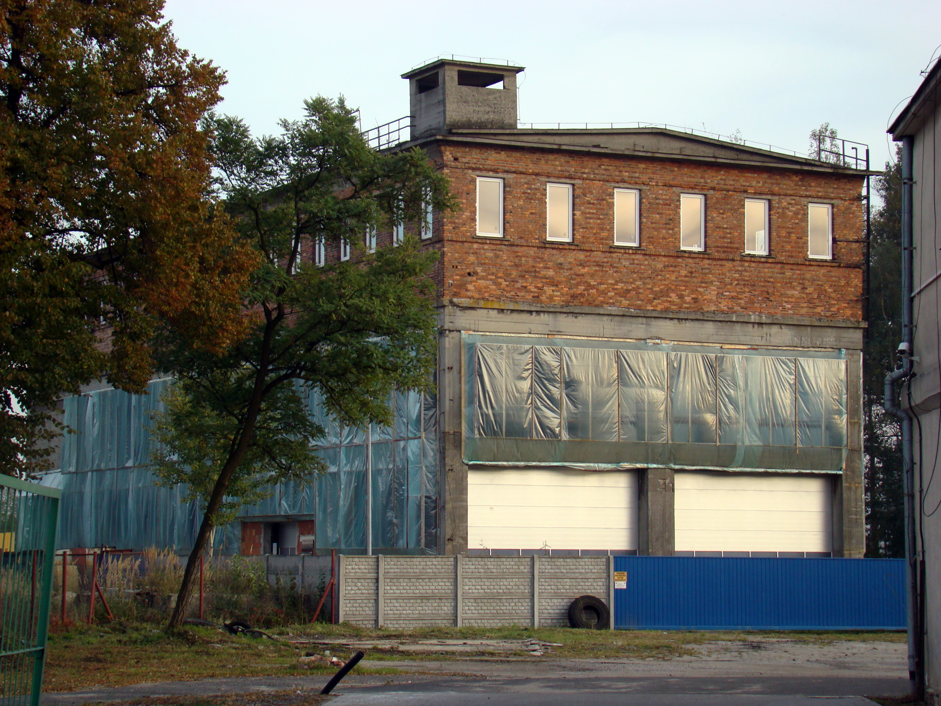 Budynek szybu dawnej kopalni rud żelaza "Barbara" w Dźbowie (Częstochowa).